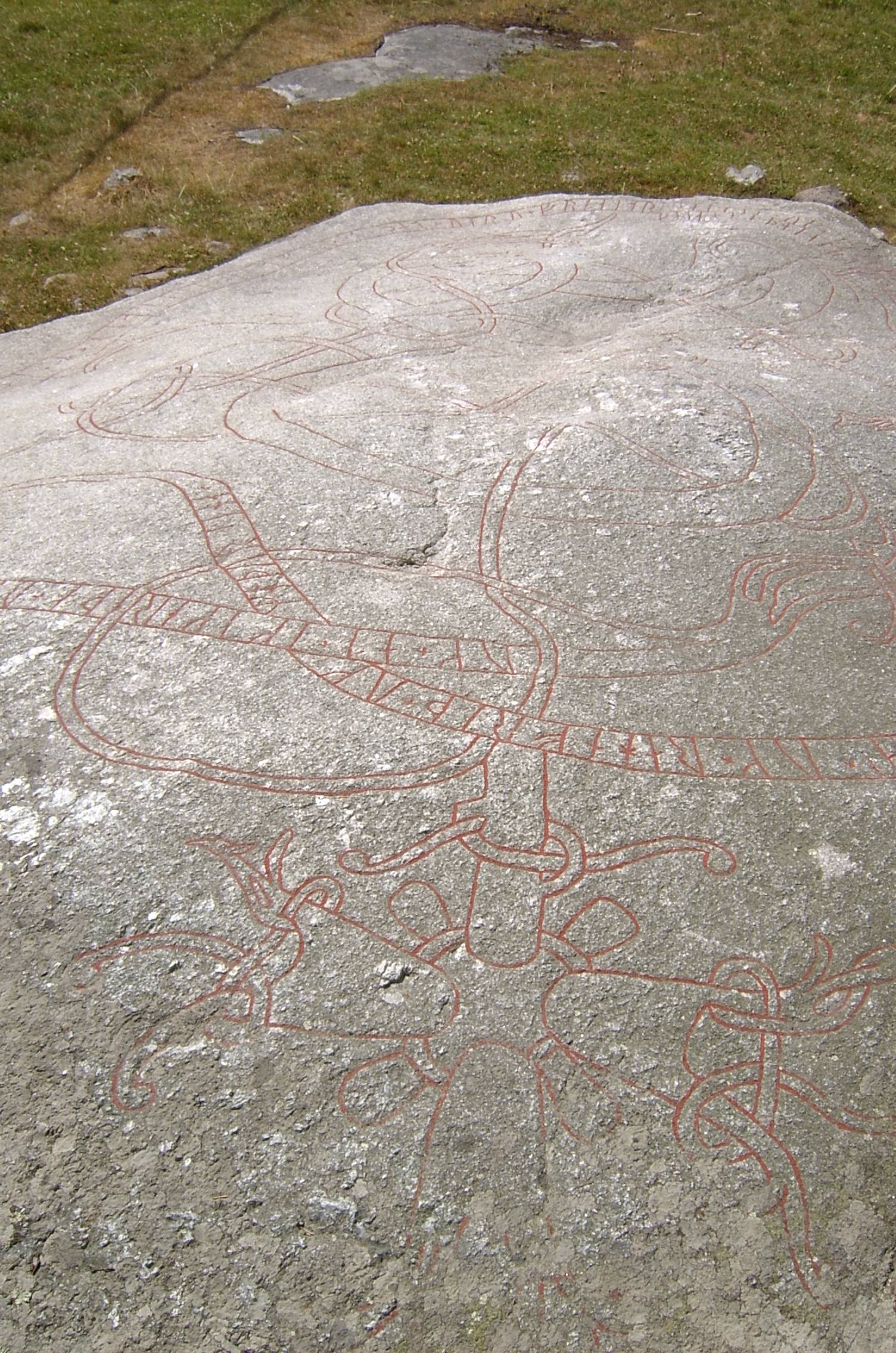 Orkesta 44:1.(U 337). Runristning. Fast fornlämning.